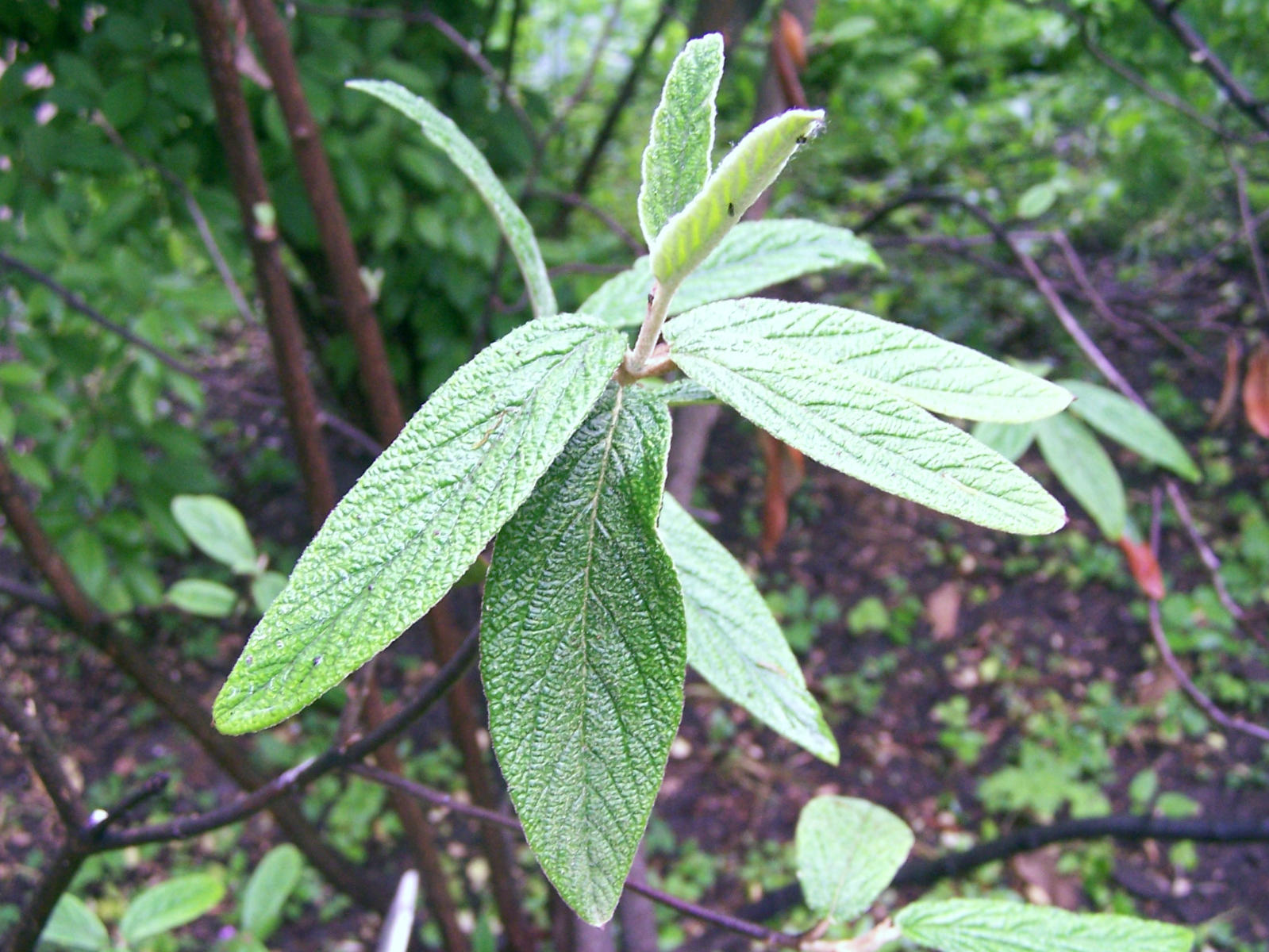 Viburnum rhytidophyllum (pl. kalina sztywnolistna)